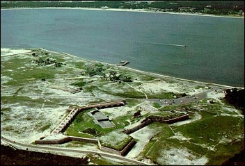 Fort Pickens (Florida)